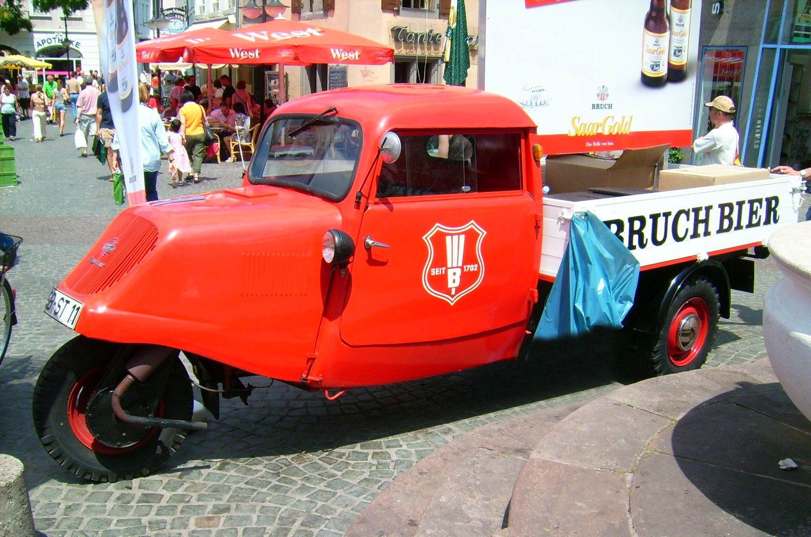 Tempo Hanseat Werbung Bruch Bier